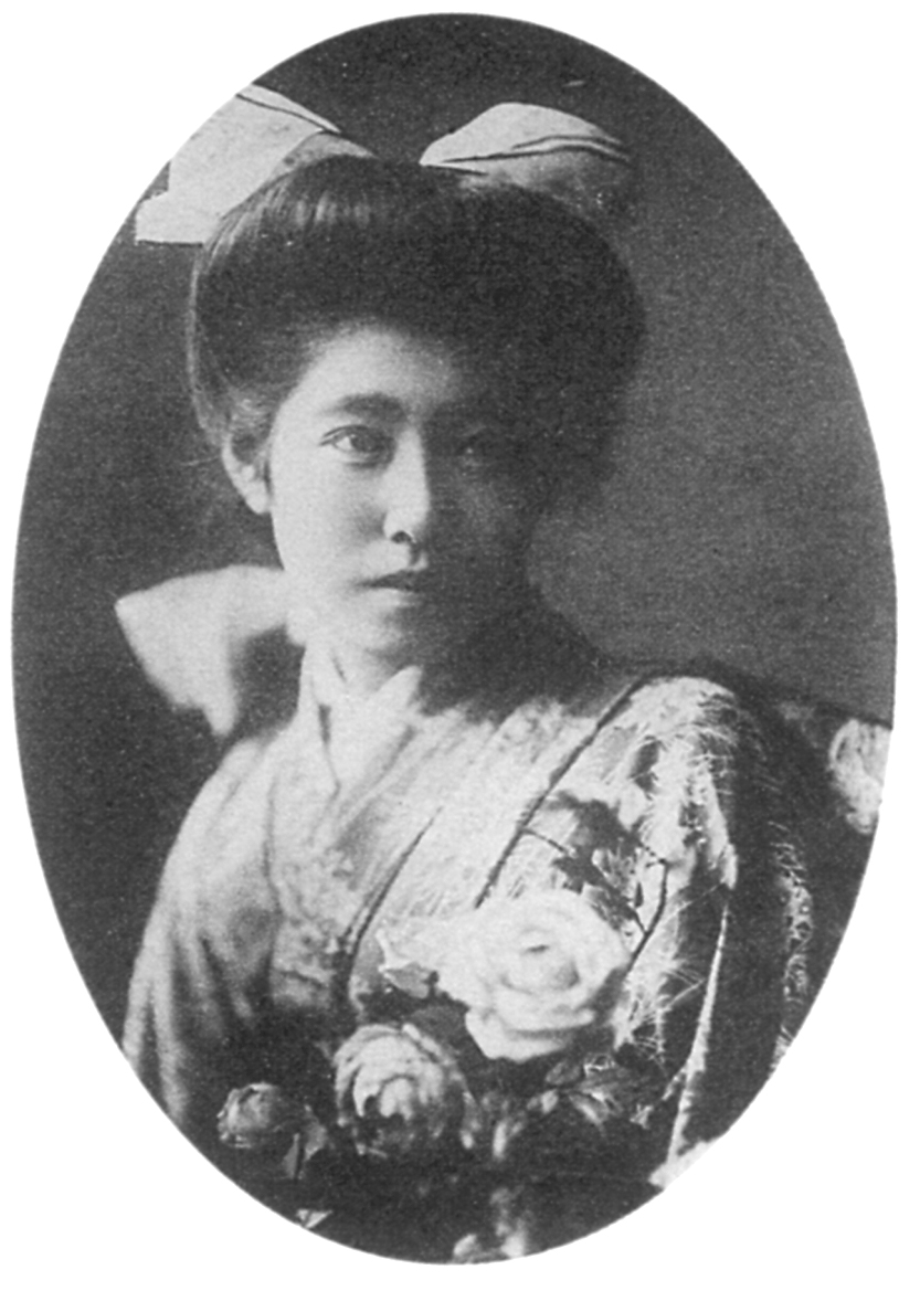 末広ヒロ子 時事新報社主催「日本美人写真募集（良家の淑女写真コンクール）」での写真。